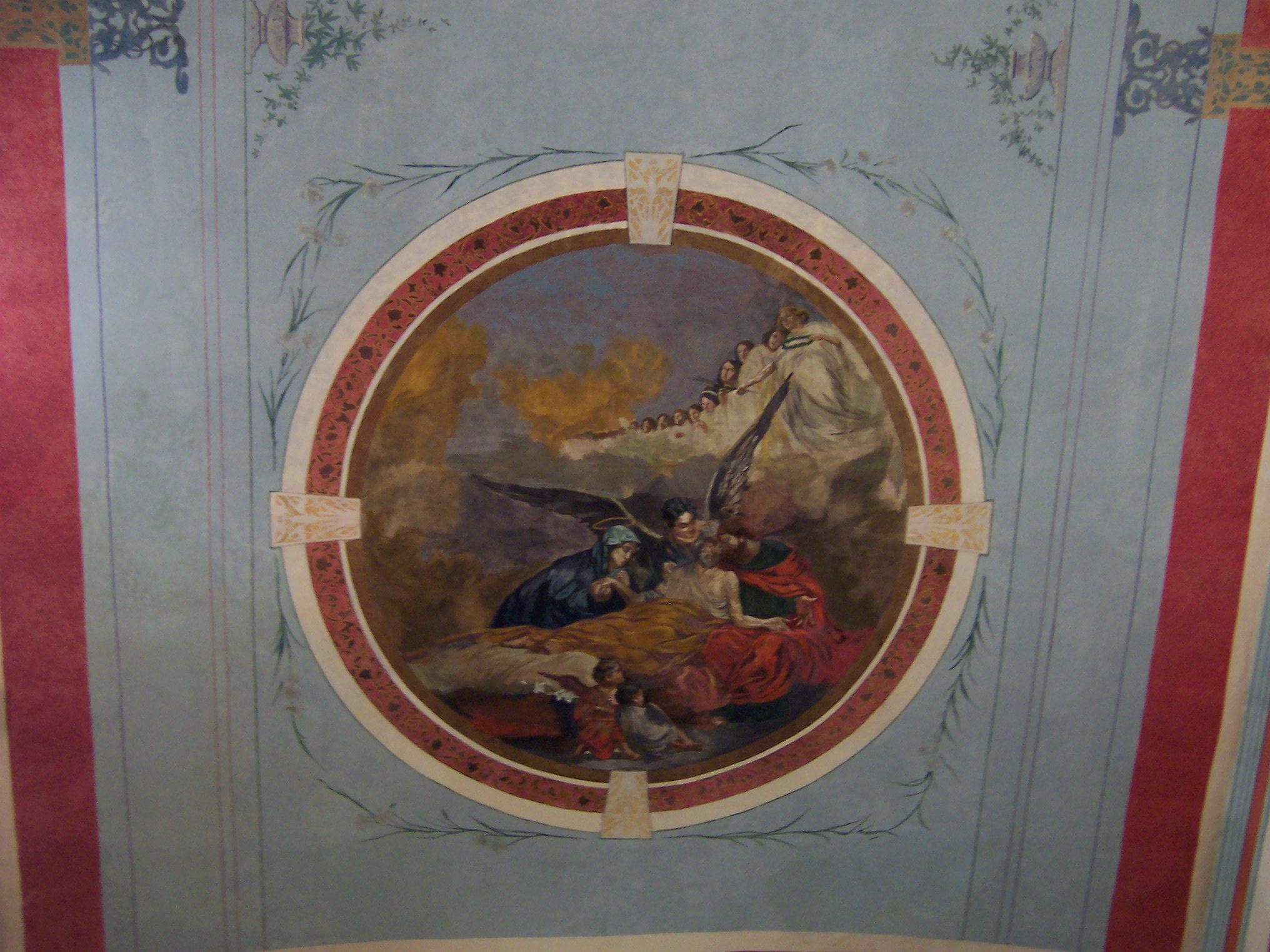 Techo de la nave central de Iglesia de Nuestra Señora de la Candelaria, Bogotá, Colombia. Esta obra se llama "La Muerte de San José"; del artista Pedro Alcántara Quijano.